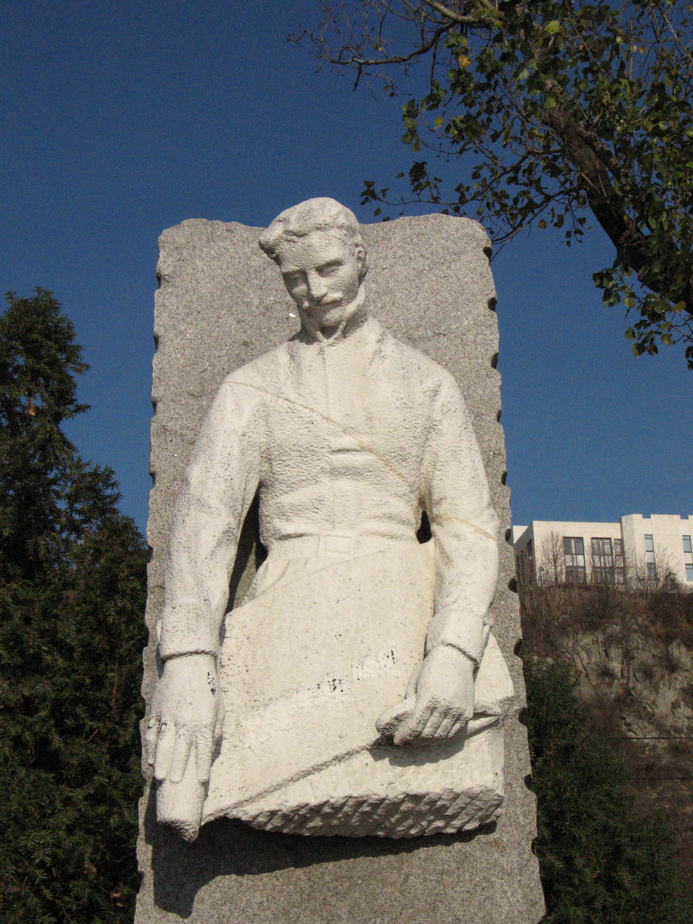 Samuel Mikovíni, 1700-1750 zememerač, kartograf, polytechnik.